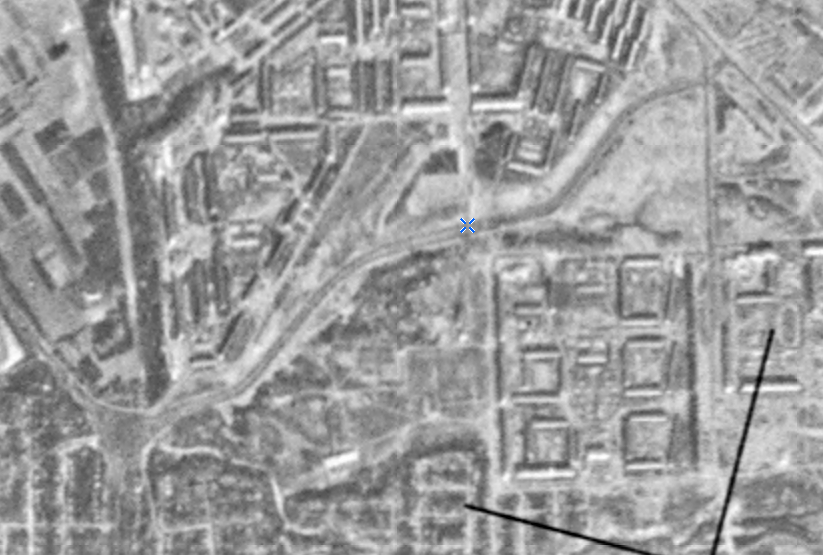 Казань. Улица Танковая (1977)